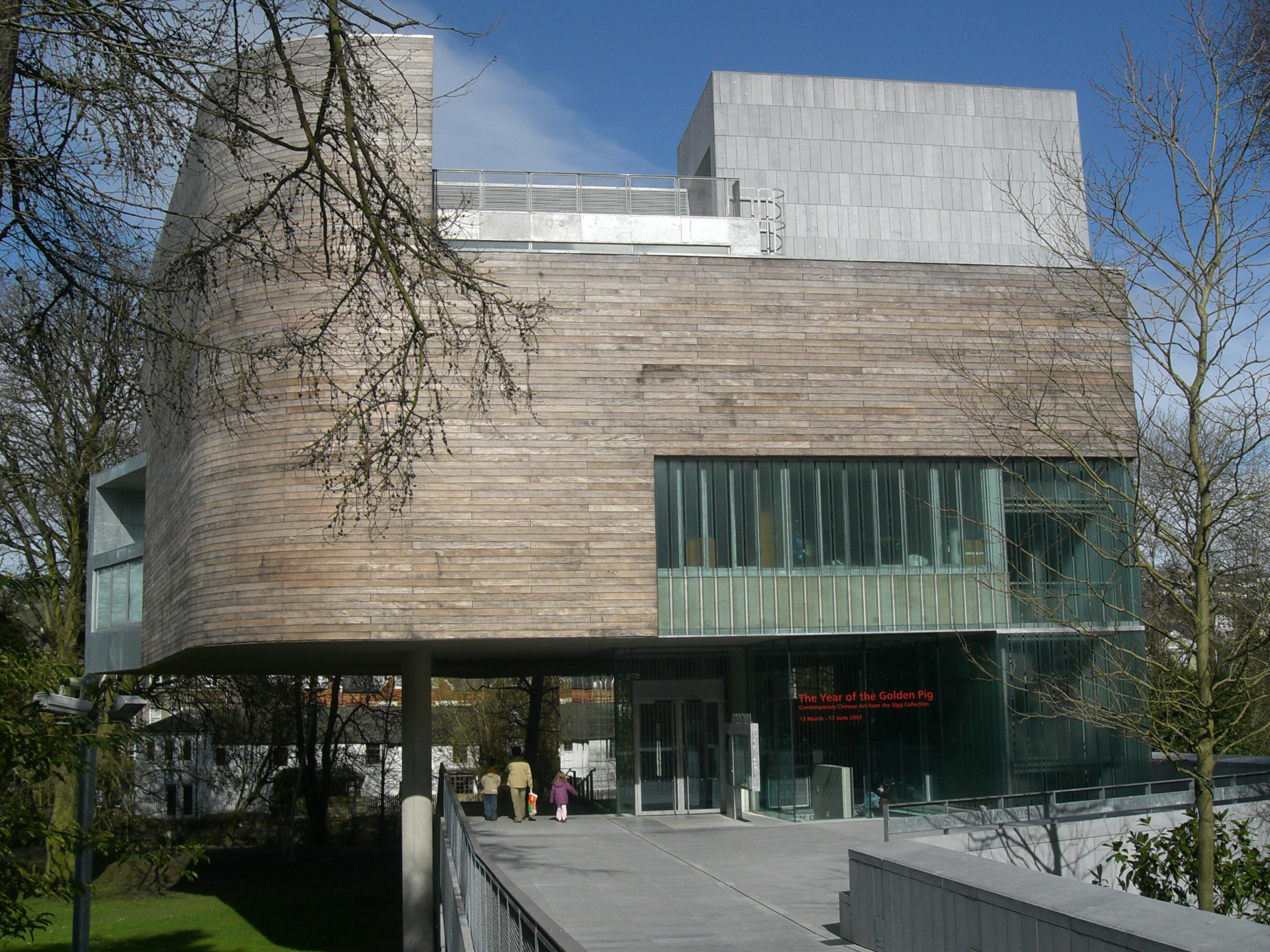 Lewis Glucksman Gallery, située sur le campus de UCC, Cork